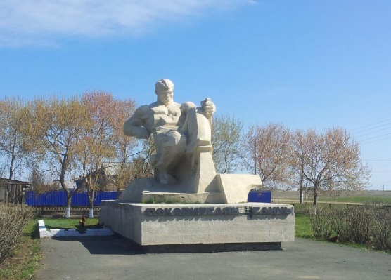 Памятник «Покорителям целины»